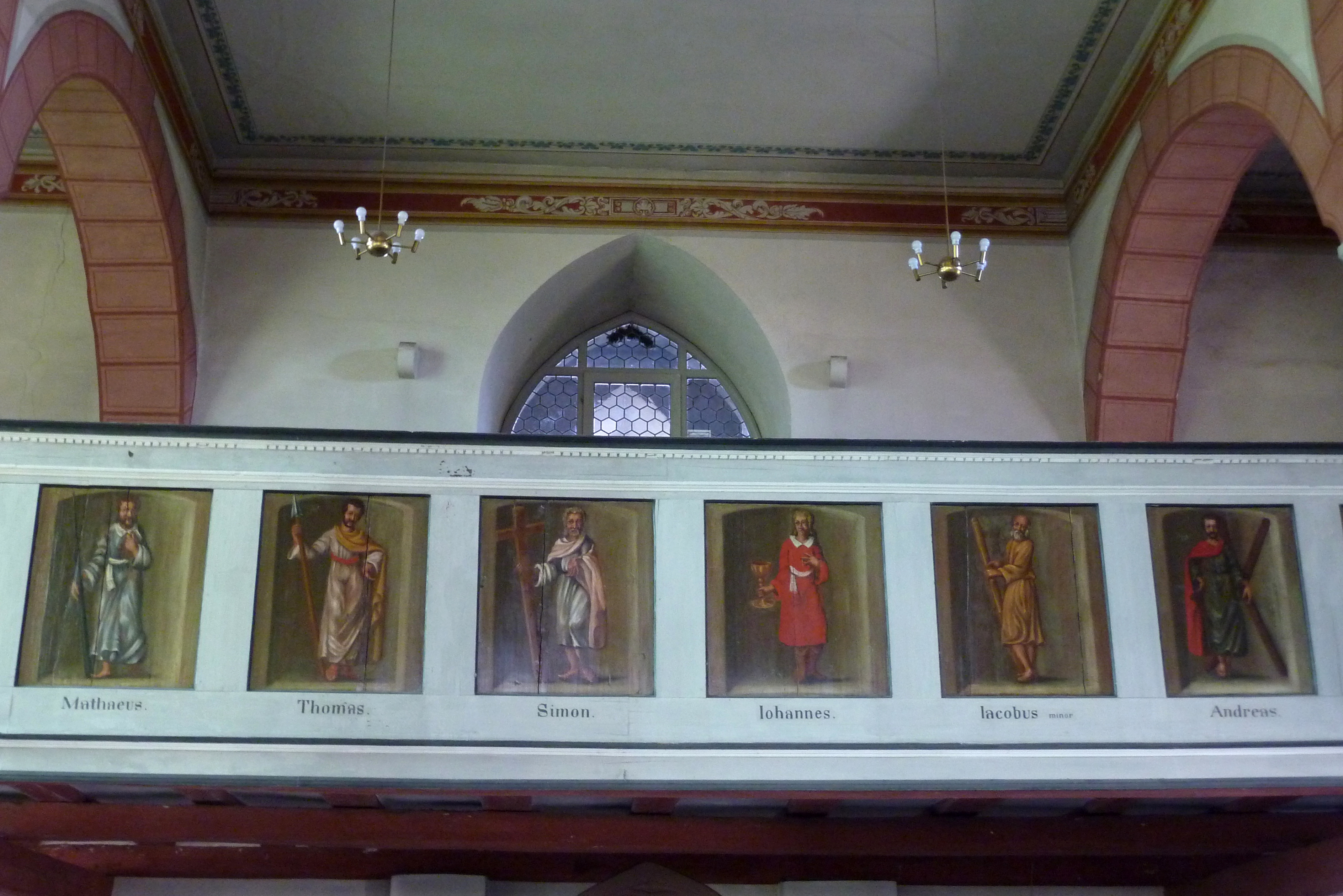 Evangelische Pfarrkirche in Usingen im Hochtaunuskreis (Hessen), Kirchgasse